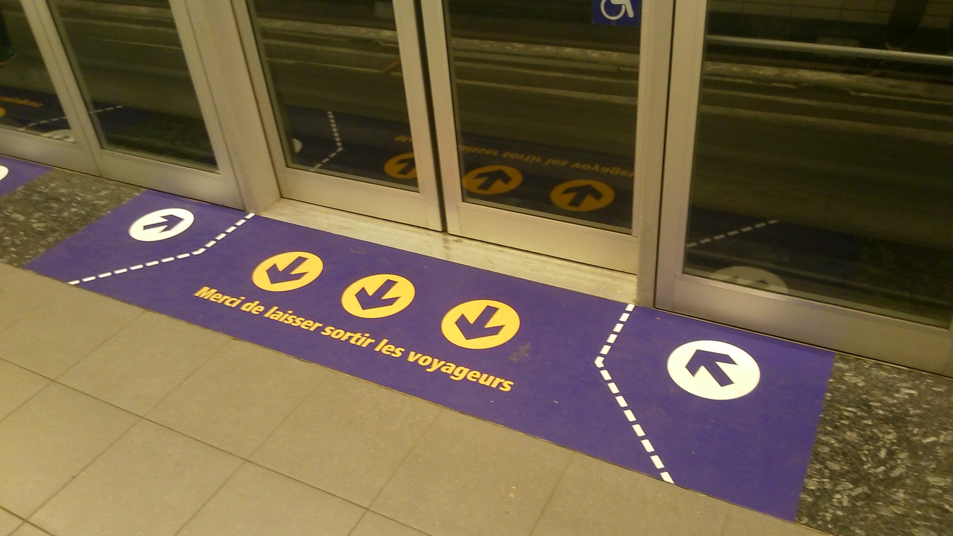 Adhésifs au sol à la station Palais de Justice sur la ligne B.